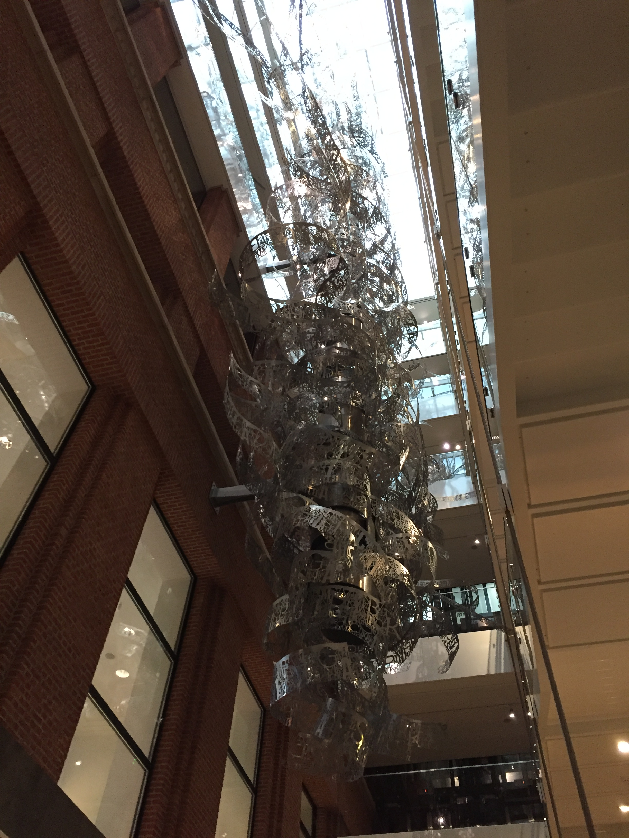 Escultura en el interior de la Casa de la Historia Europea en Bruselas.